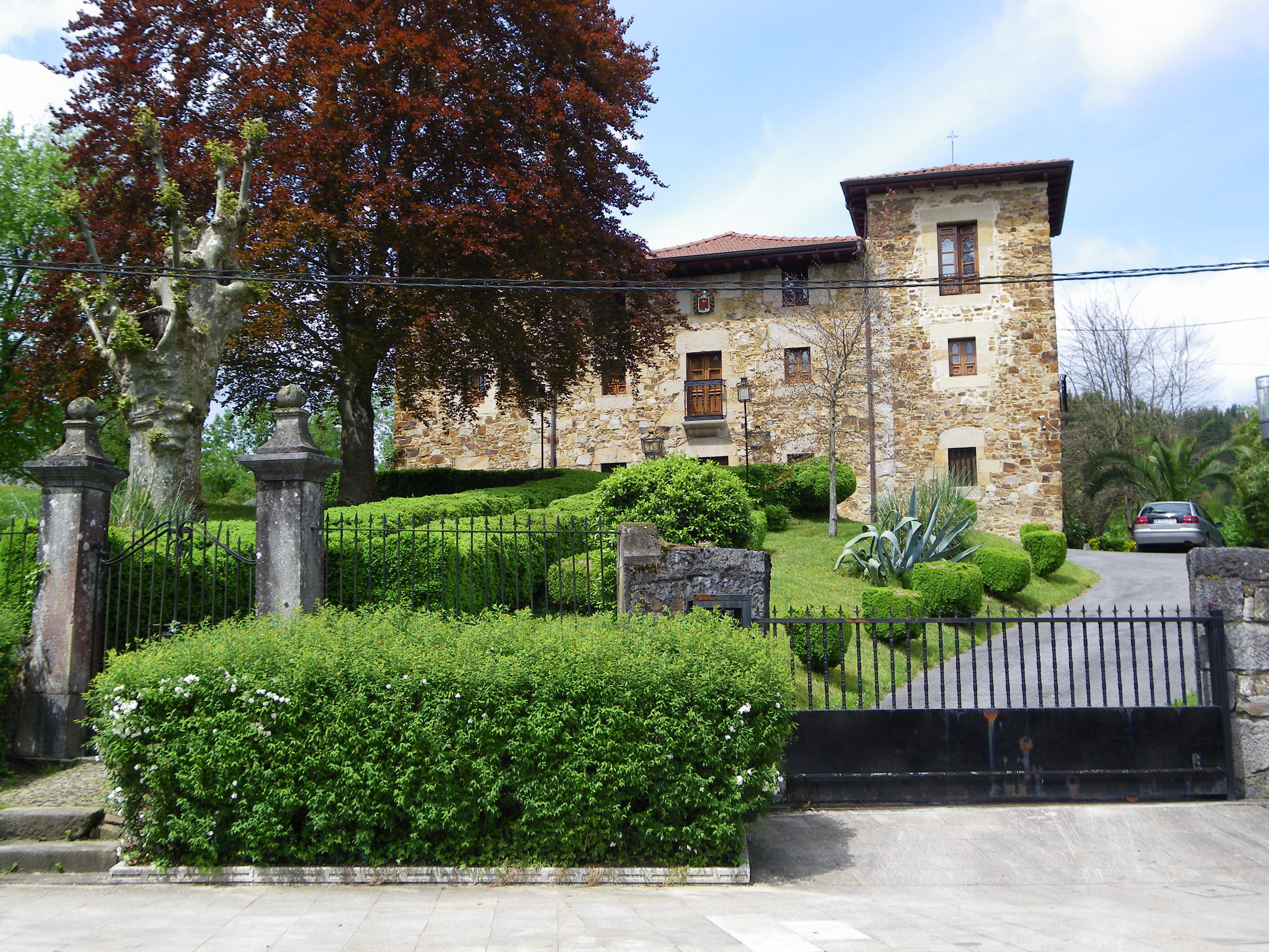 Vildosola edo Yurregoikoa jauregia, Elexalde kalea, Igorre, Bizkaia, Euskal Herria.